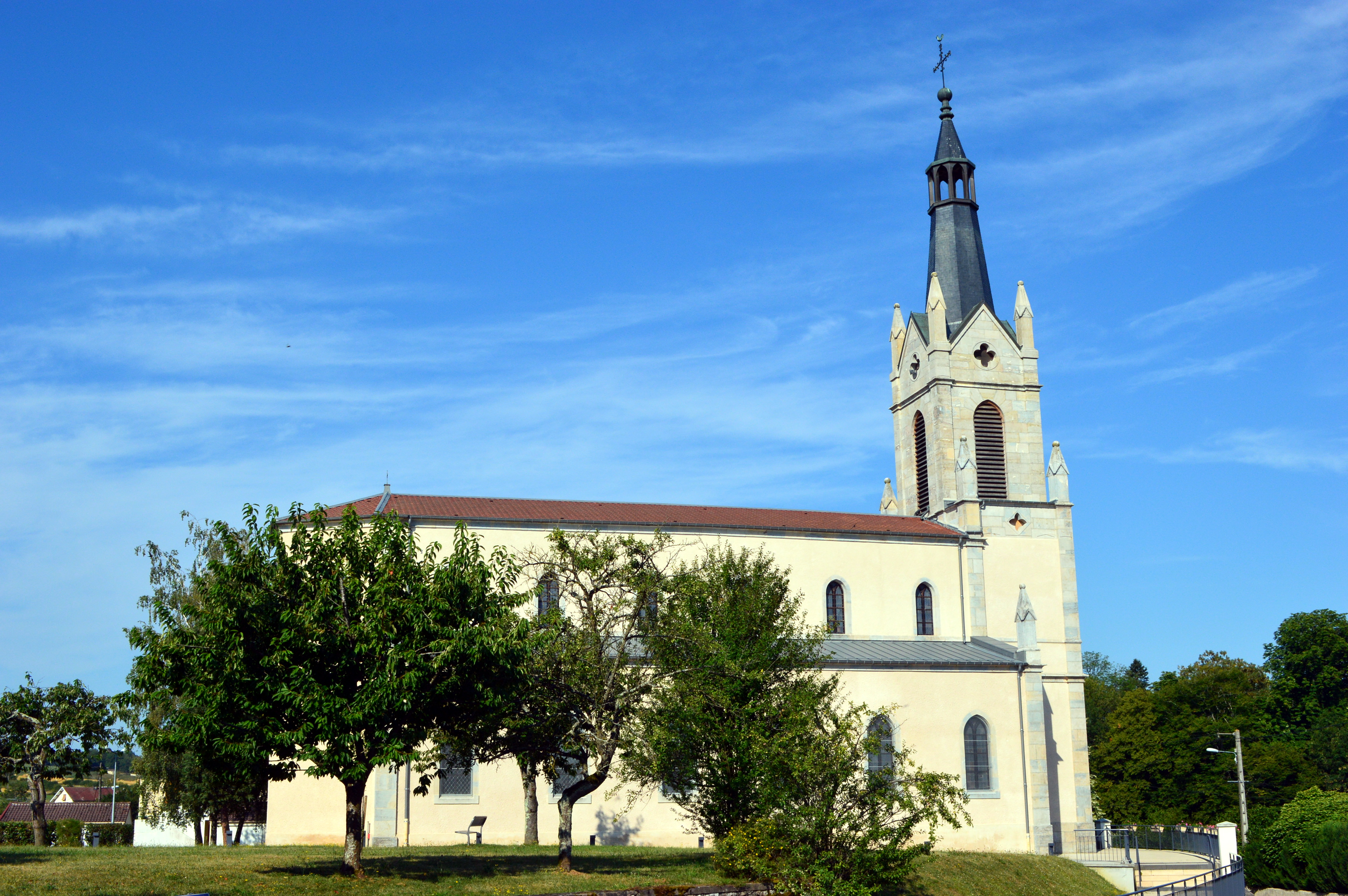 L'église Saint-Martin de Noironte durant l'été 2018. Vue depuis le verger sur la façade est.